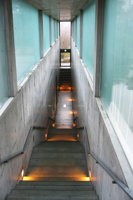 アサヒビール大山崎山荘美術館 新館（安藤忠雄設計）への下り階段 2006.1.4 本人撮影ja:Category:大山崎町の画像